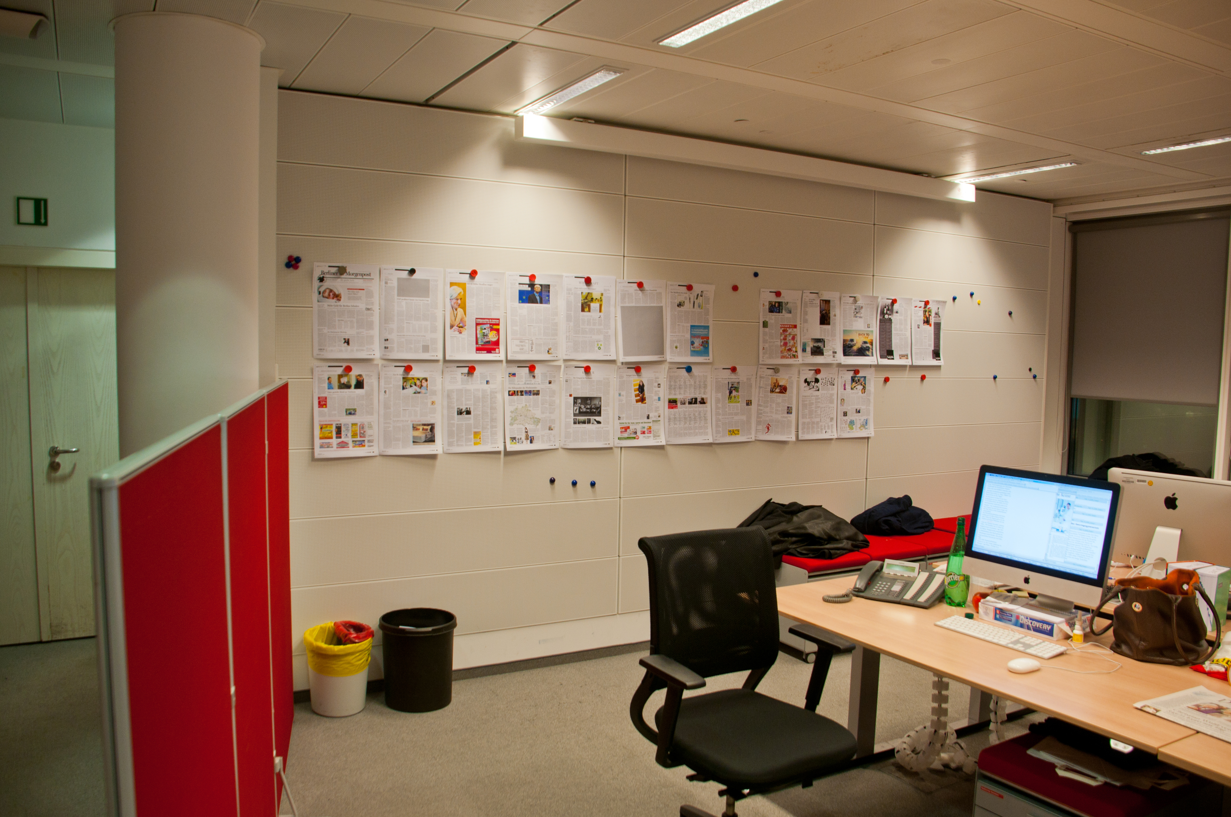 Wikipedia Stammtisch Berlin zu Besuch im Springer- Hochhaus